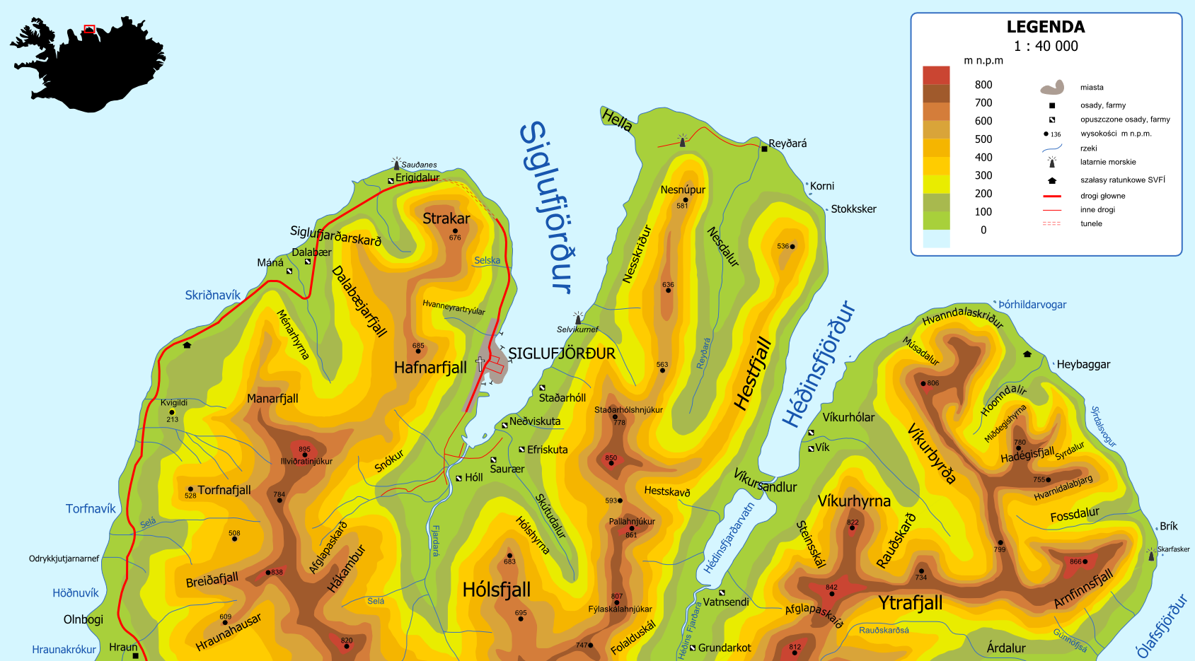 Siglufjörður